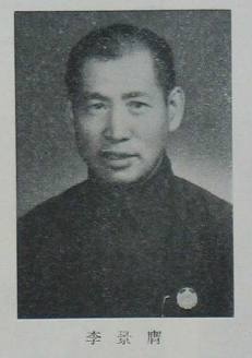 中文（台灣）: 中國人民政治協商會議第一屆全體會議代表